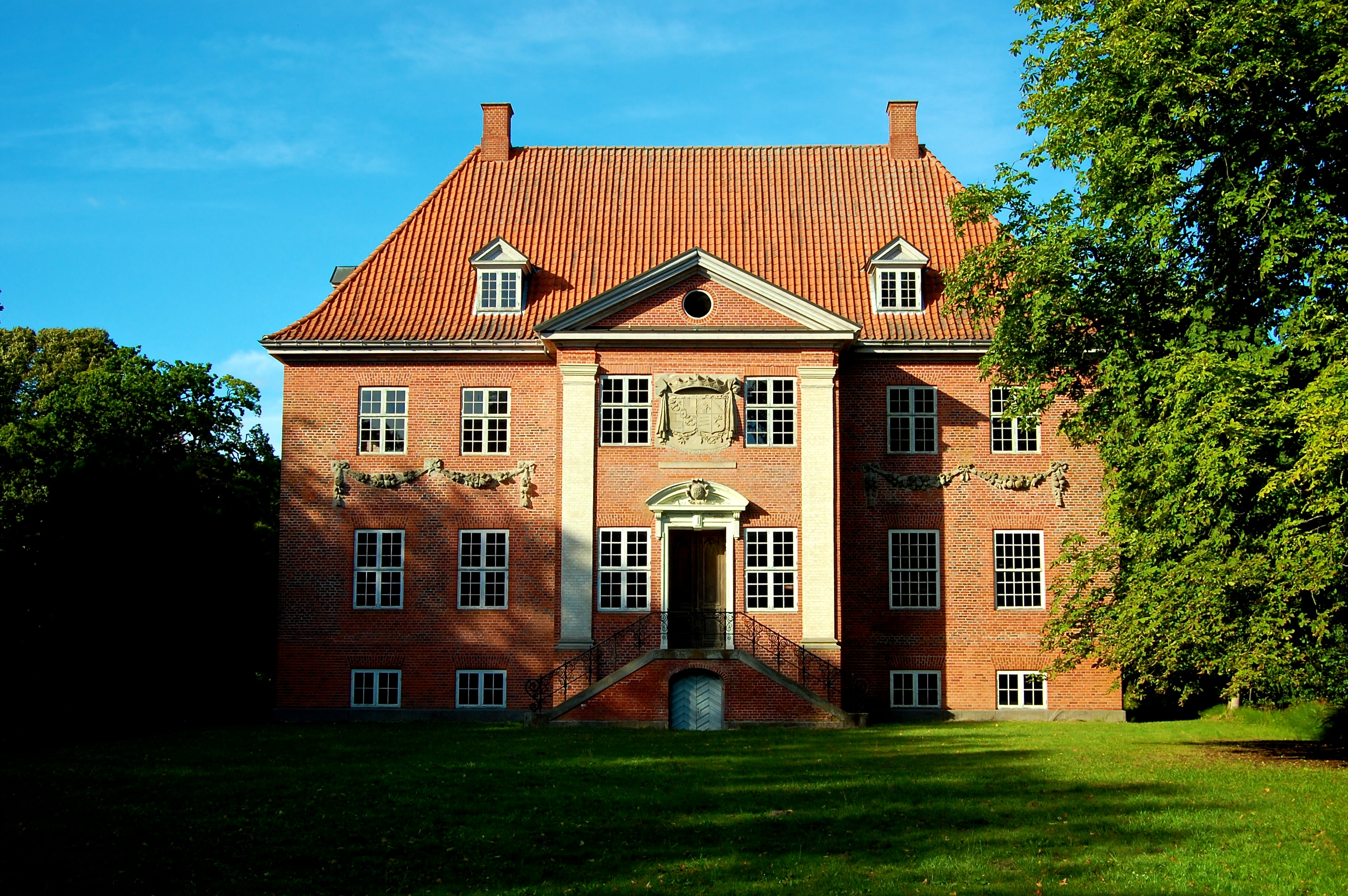 Christianssæde